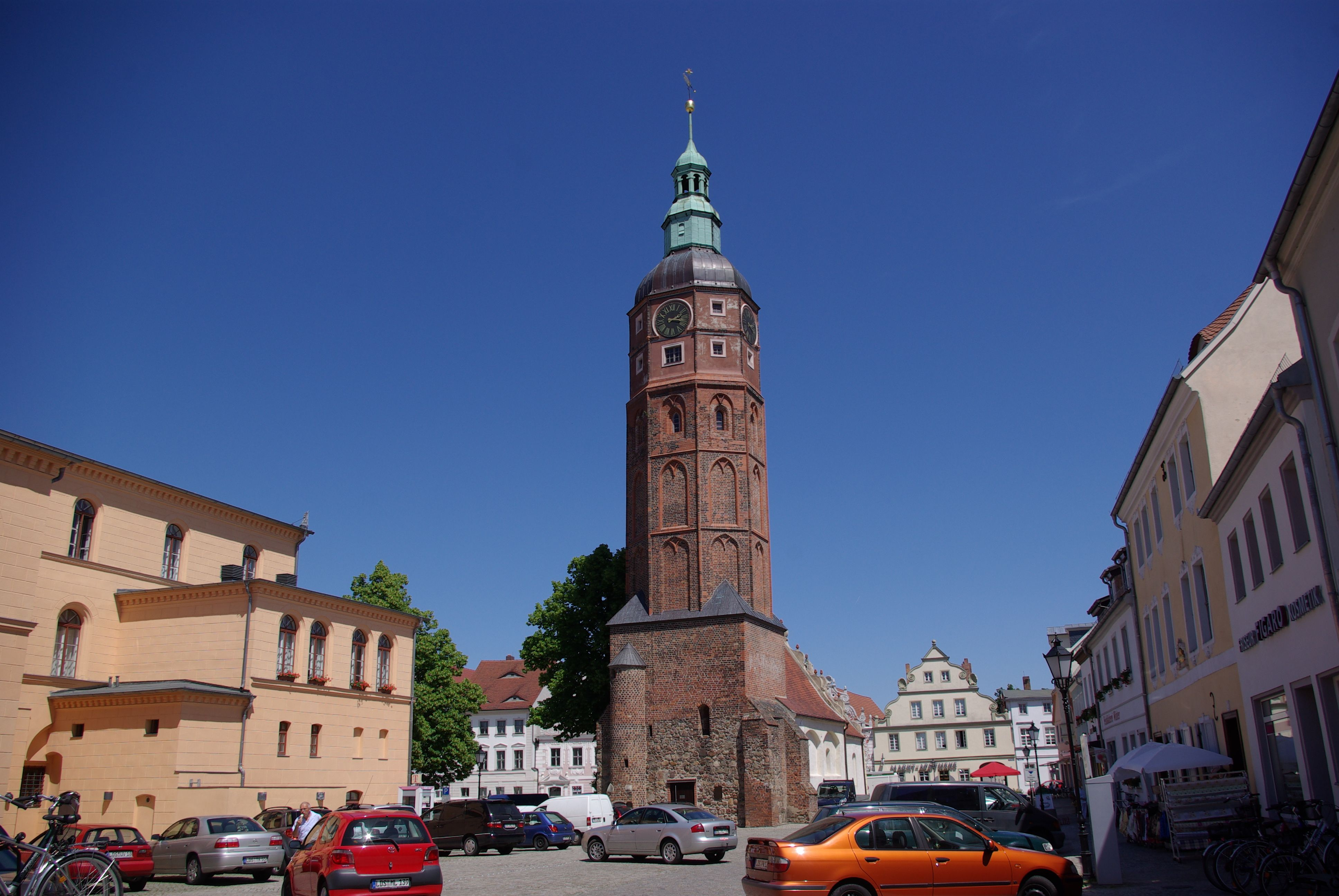 Luckau in Brandenburg. Der Hausmannturm steht am Markt und steht unter Denkmalschutz. Der Turm kann bestiegen werden.